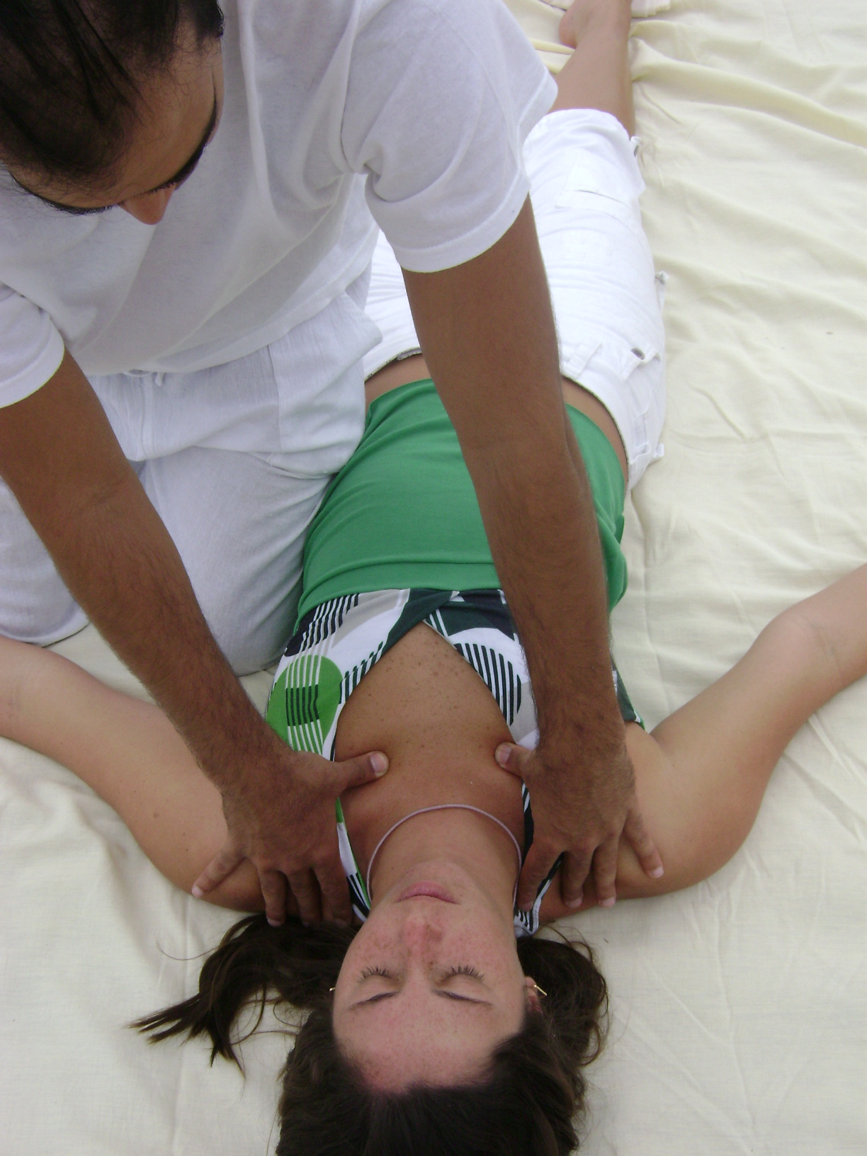 Shiatsu sendo aplicado ao ar livre. O Shiatsu promove a saúde e o contato com a natureza interna e externa.